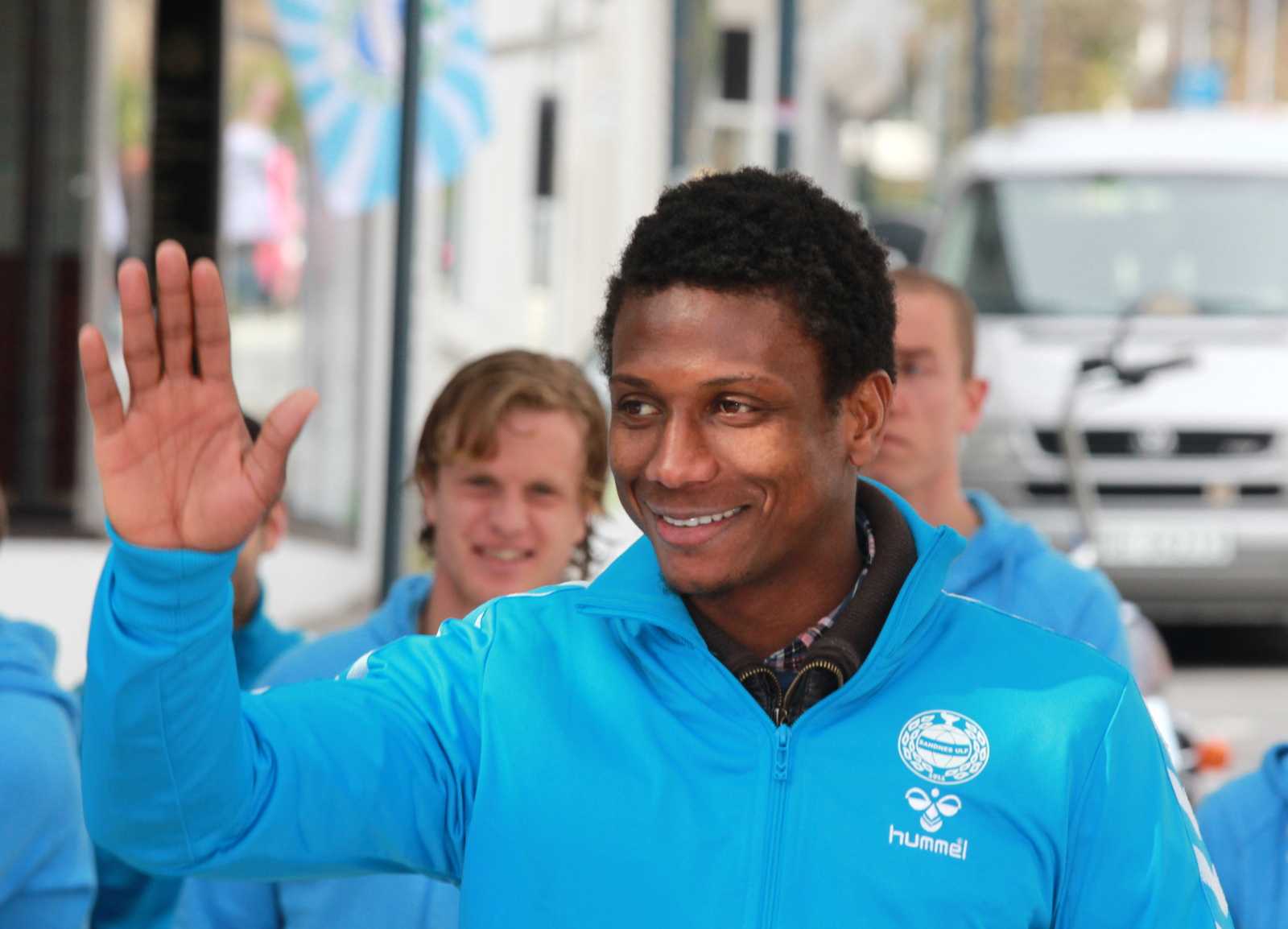 Tijan Jaiteh foran 2014 sesongen for Sandnes Ulf